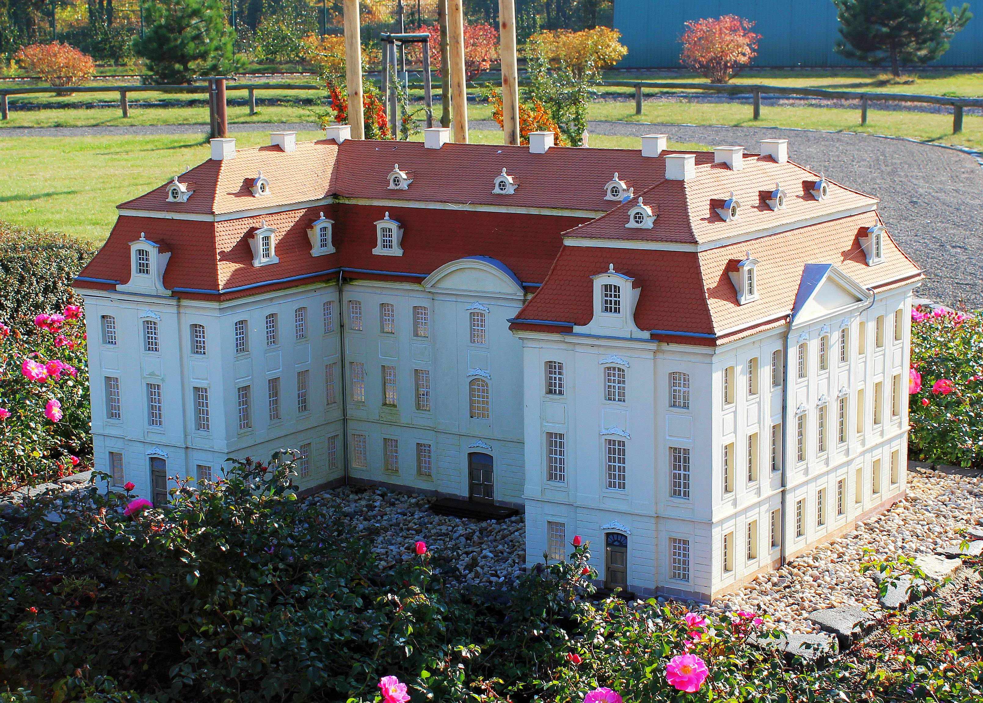 Modell vom Schloss Martinskirchen im Miniaturenpark Elsterwerda